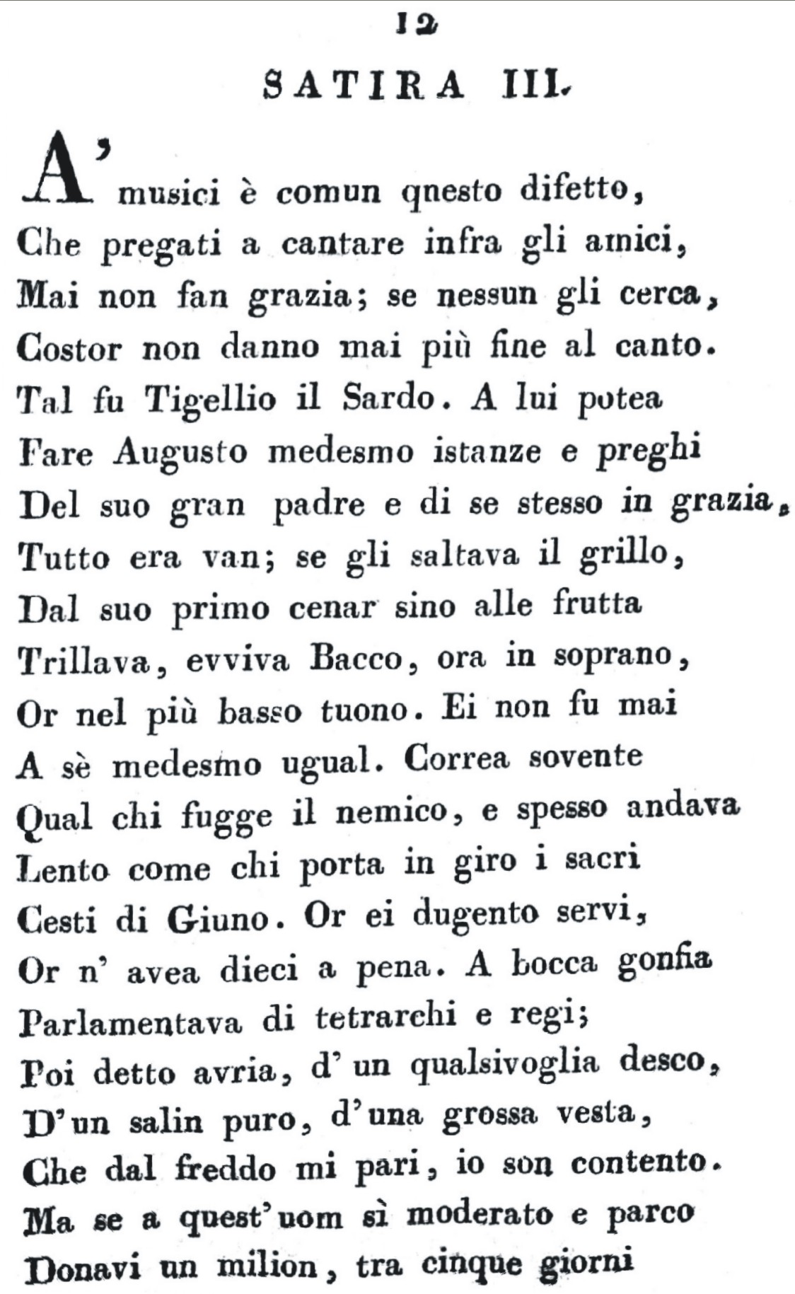 Photo of the book "Le satire e l'epistole di Q. Orazio Flacco", printed in 1814.